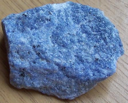 minerał; kwarc (niebieski); dumortieryt; pochodzenie Brazylia; autor zdjęcia Sebastian Socha; 05.08.2006r.